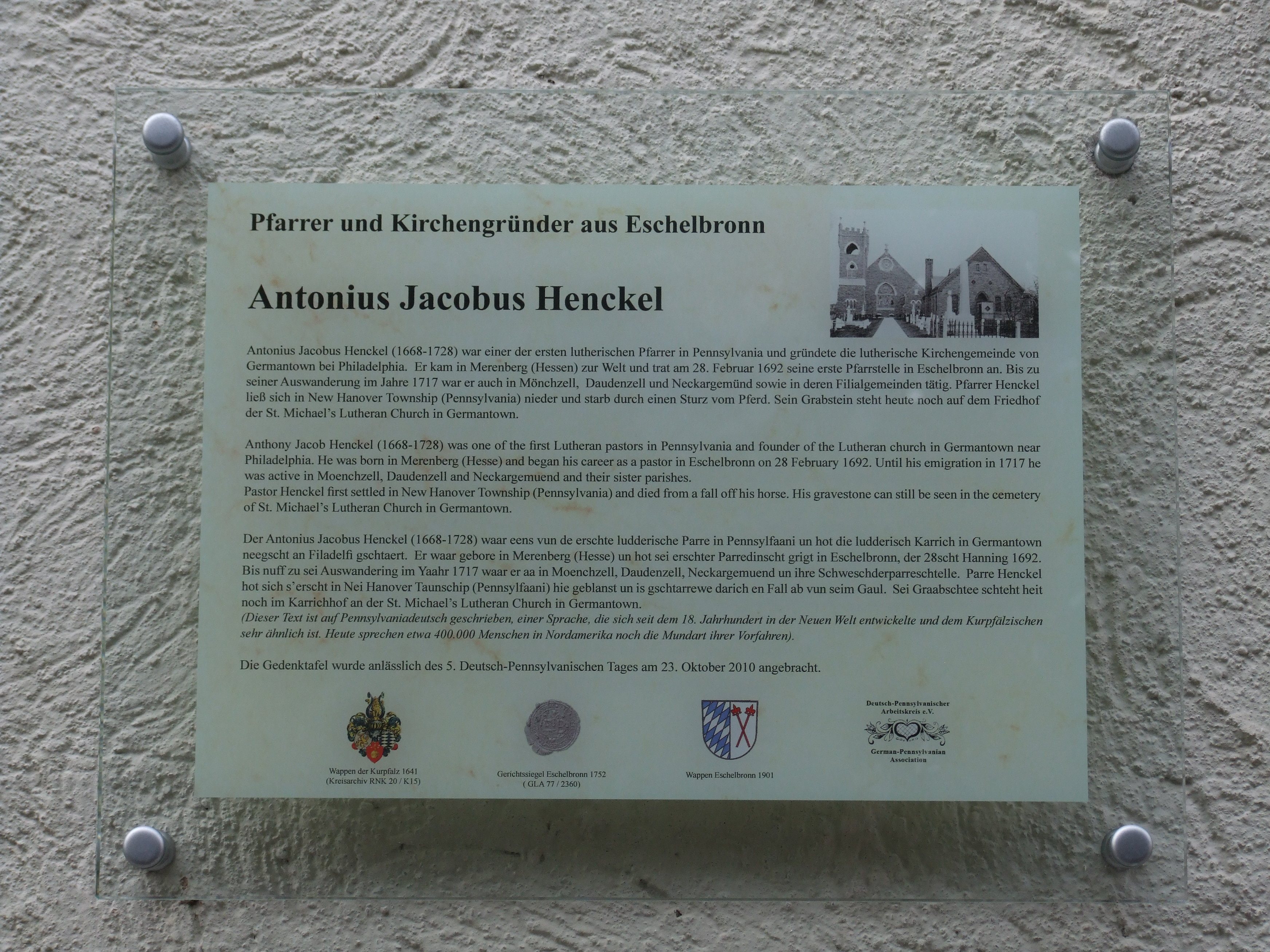 Infotafel an der Evangelischen Kirche in Eschelbronn